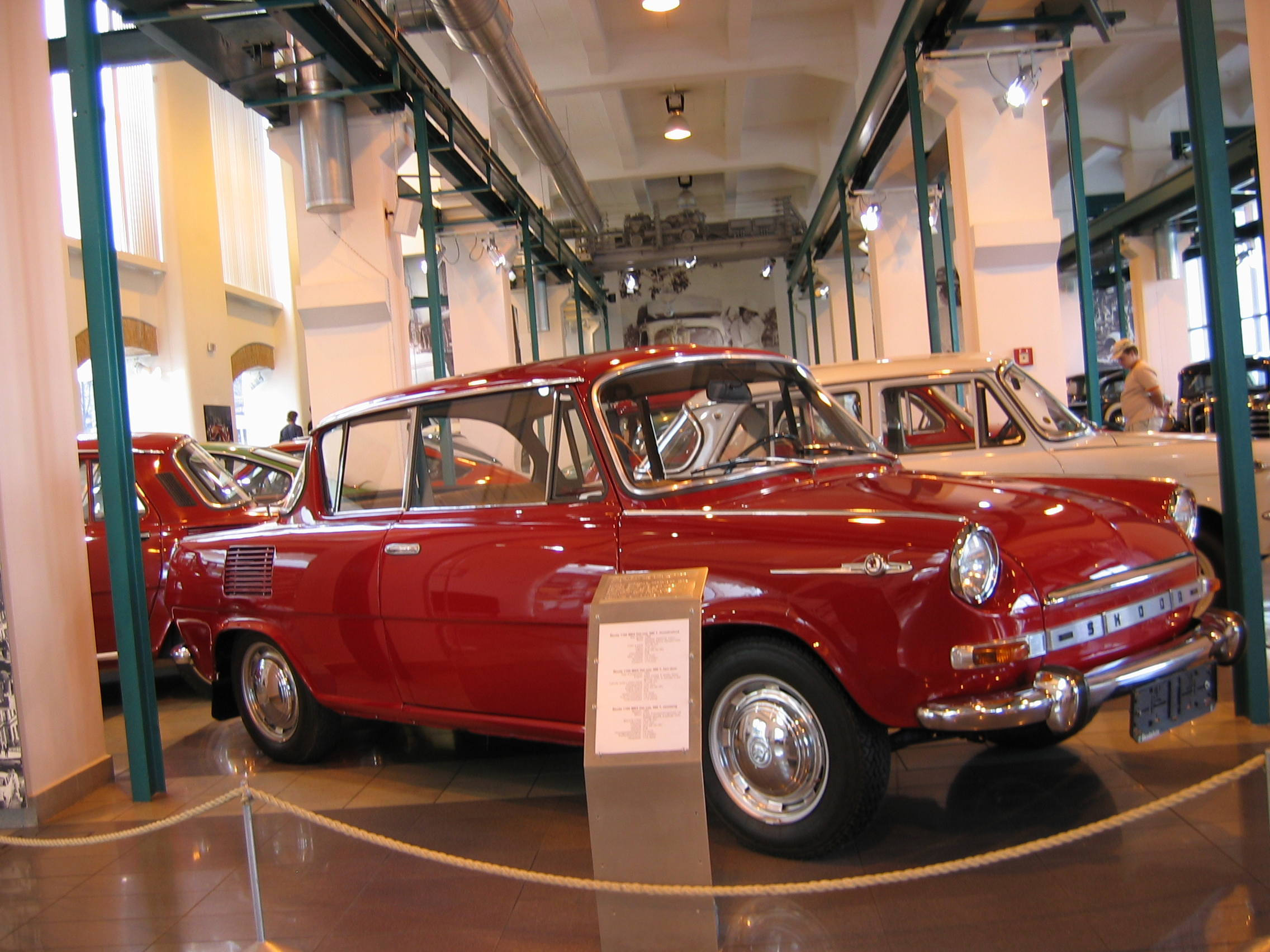 Škoda 1100 MBX de Luxe - Škoda Auto Museum, Mlada Boleslav